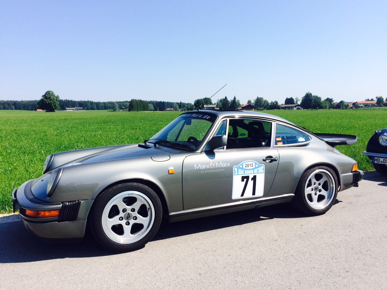 SCR in 2015